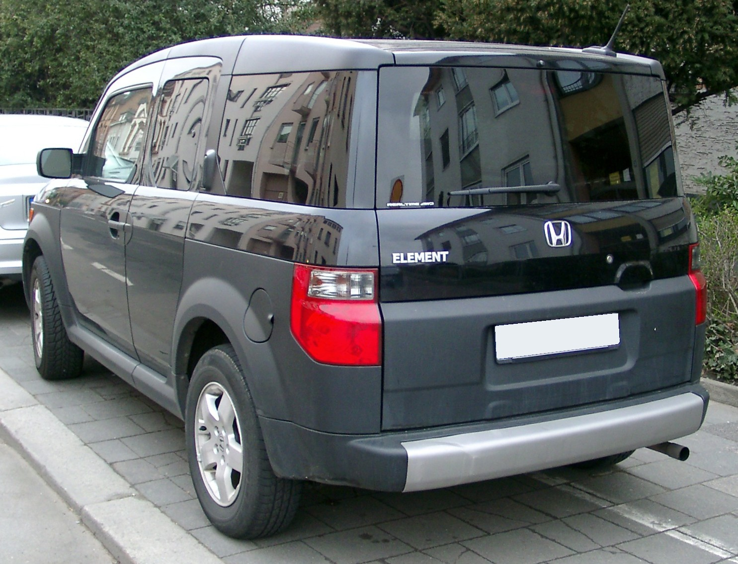 Honda Element